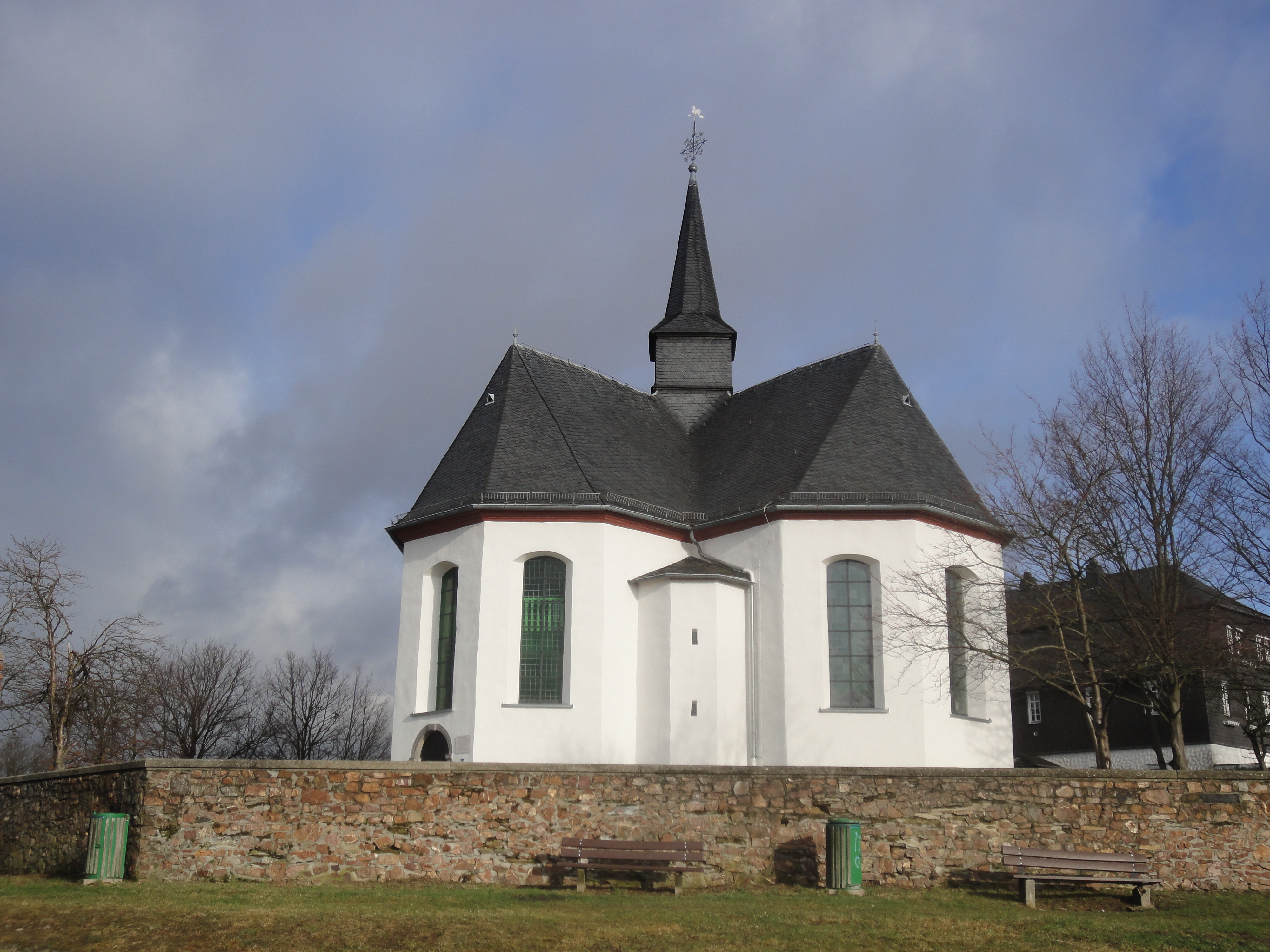 Außenansicht der Kreuzkapelle in Bad Camberg